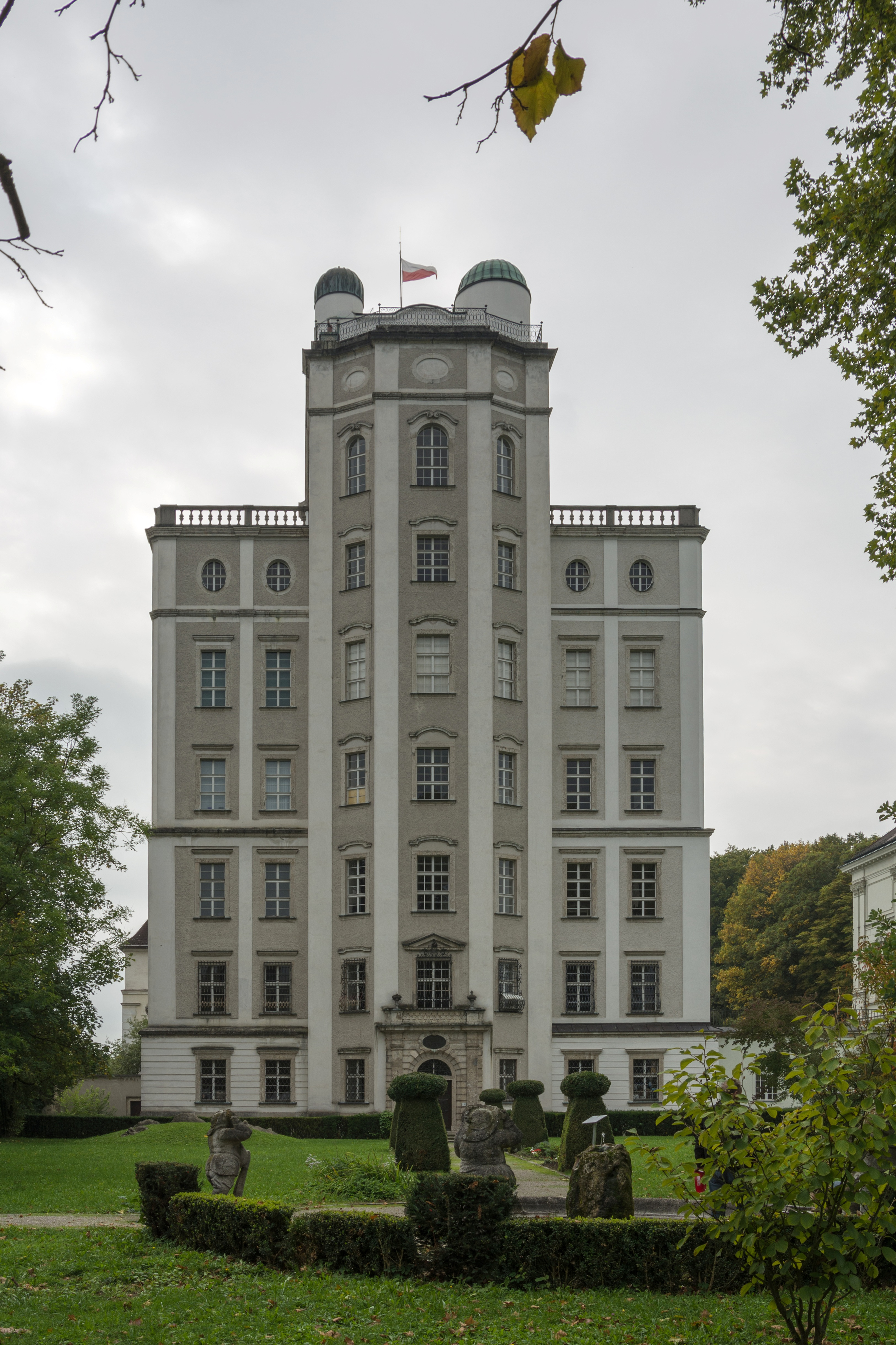 Gesamtanlage Stift Kremsmünster und Stiftskirche Göttlicher Heiland. Die Sternwarte wurde zwischen 1748 und 1759 erbaut. Seit 1762 wird hier ein meteorologischen Observatorium betrieben. Sie beherbergt auch die umfangreiche naturhistorische Sammlung des Stiftes Kremsmünster.